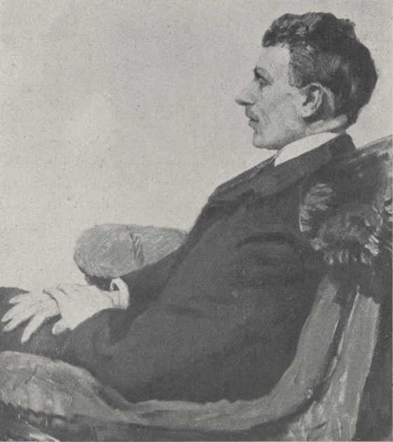 Alfred Gold im Alter von 30 Jahren, Zeichnung von Moritz Coschell, 1904